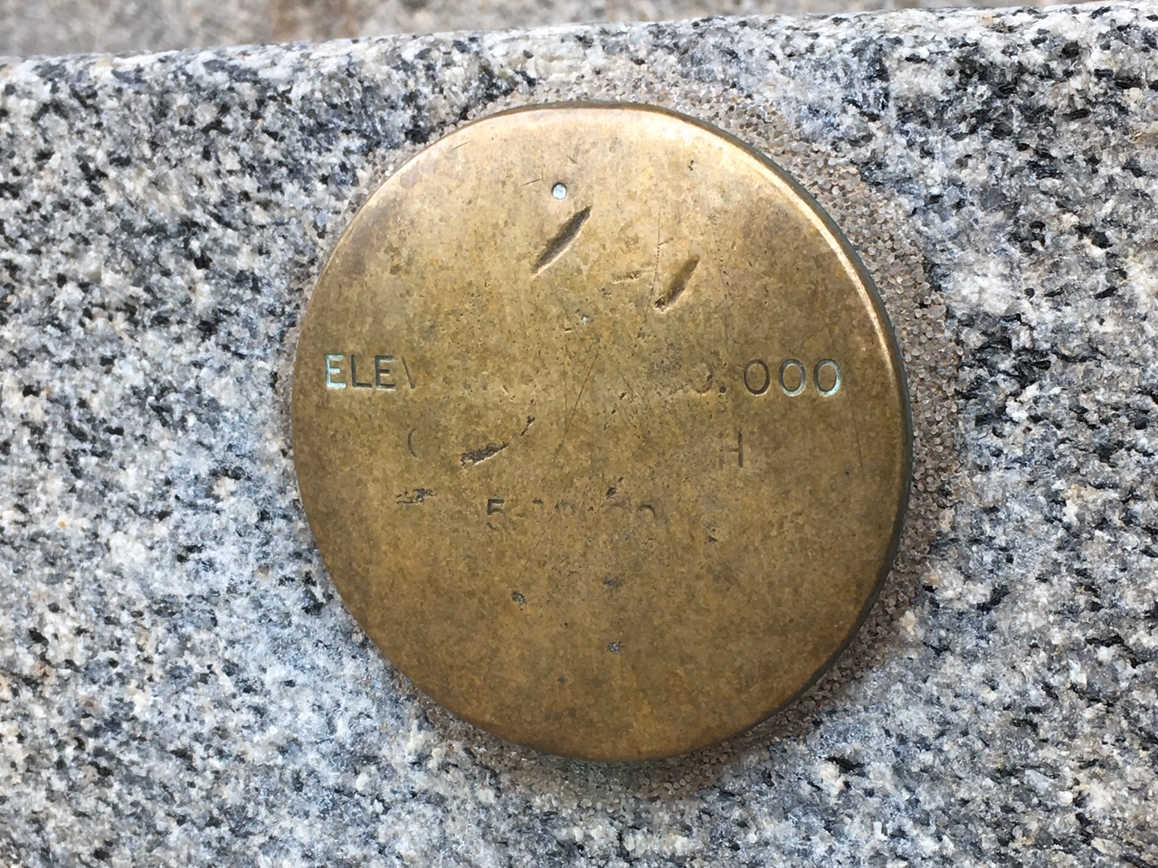 表面がすり減っており、詳細は確認不可能